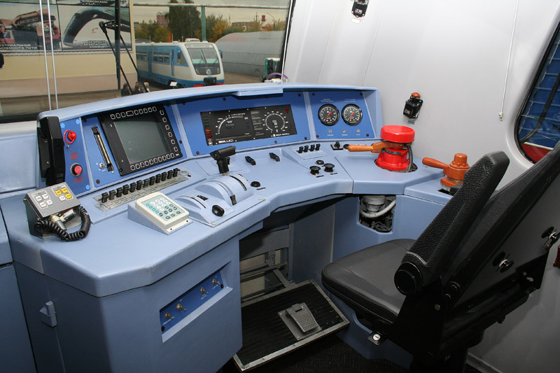 Кабина электровоза ЭП2К-002, ЭК ВНИИЖТ, Щербинка